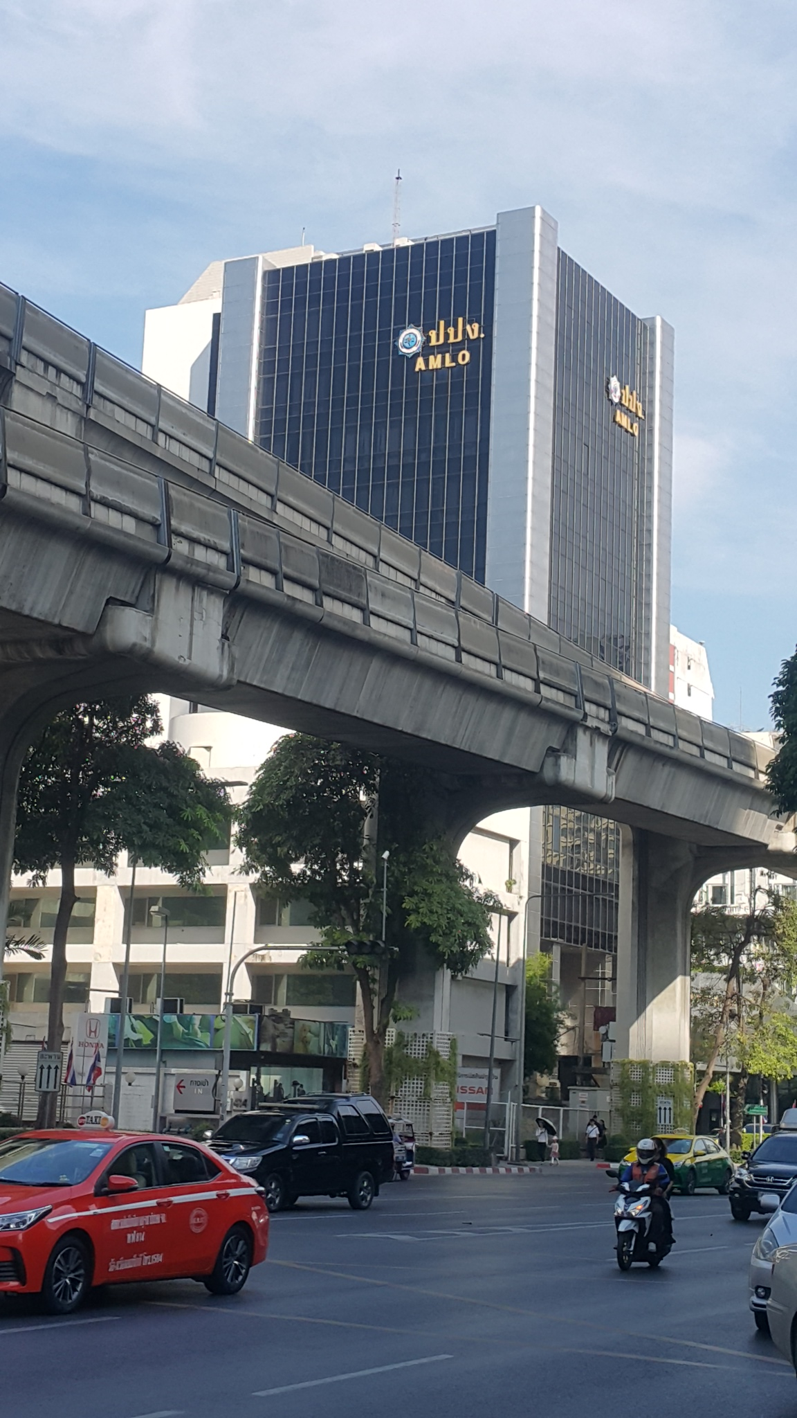 สำนักงานป้องกันและปราบปรามการฟอกเงิน พญาไท